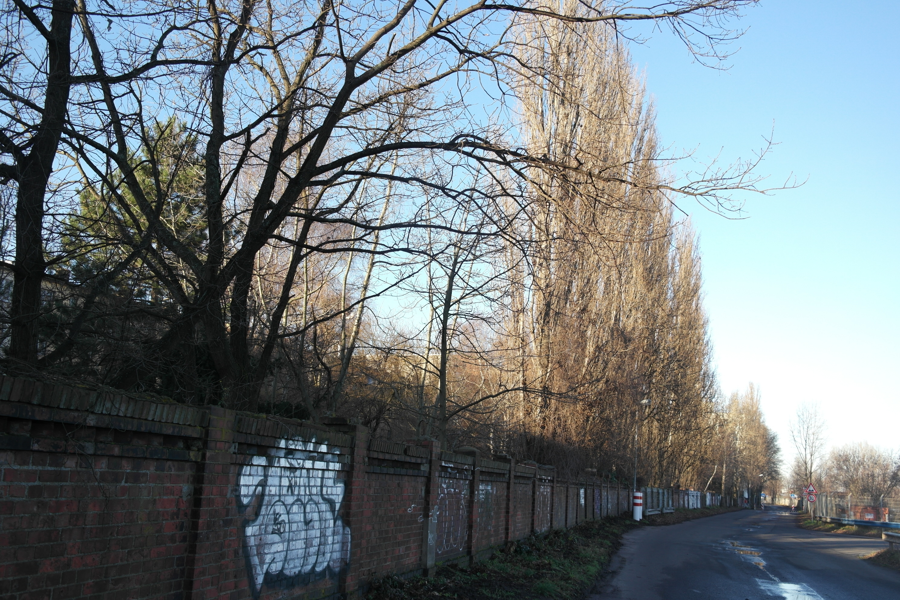 Mauer zu den Grundstücken an der Wolliner Straße am ehemaligen Güterbahnhof Berlin Eberswalder Straße, dem früheren Nordbahnhof